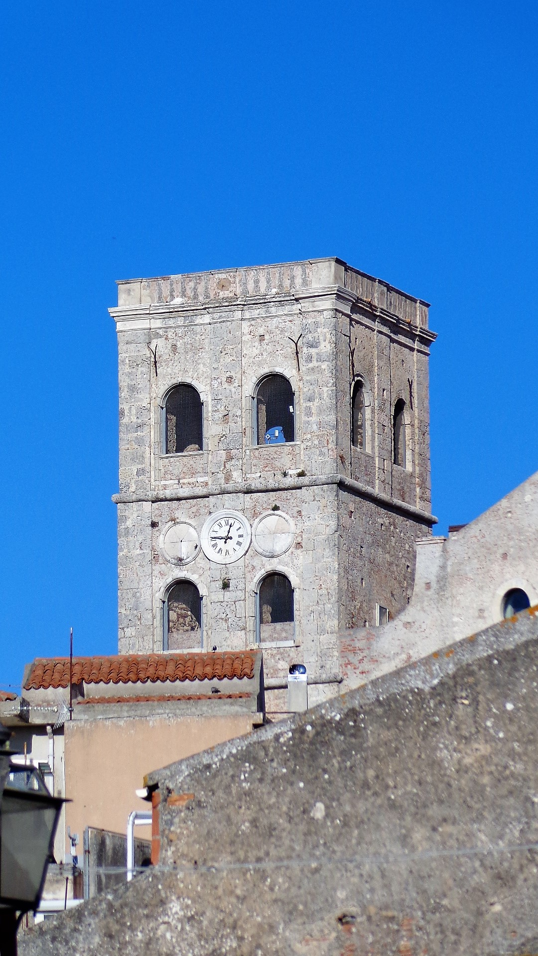 Torre campanaria vista dal Belvedere.